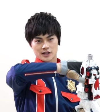 【変身講座】パトレン１号 マル秘ミッション（バンダイ公式チャンネル）